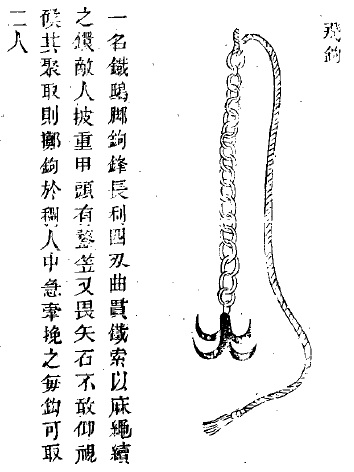 Фэйгоу.